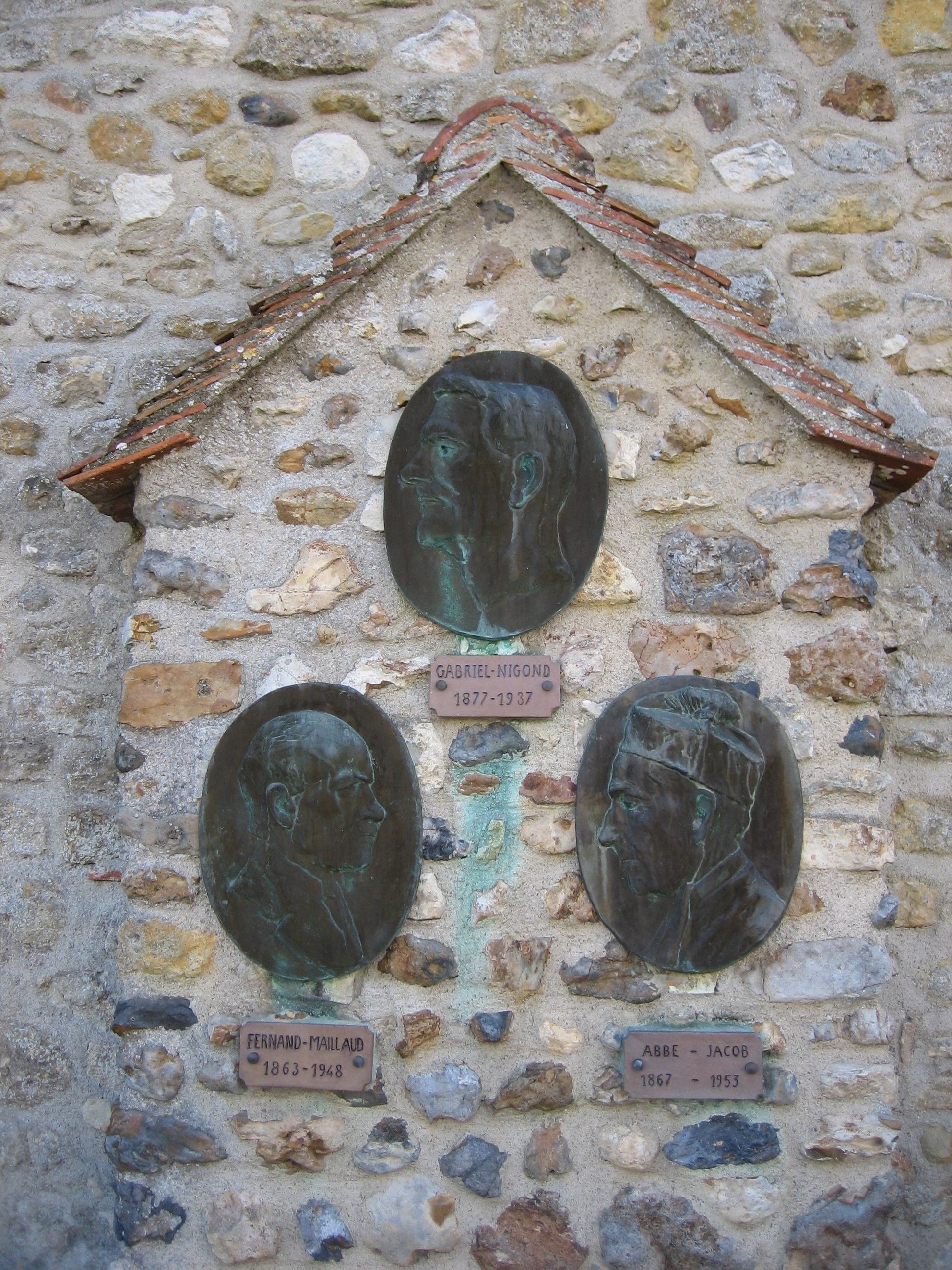 Médaillons de Nigond Maillaud et Jacob sur un pilier nord de l'église de Verneuil-sur-Igneraie.